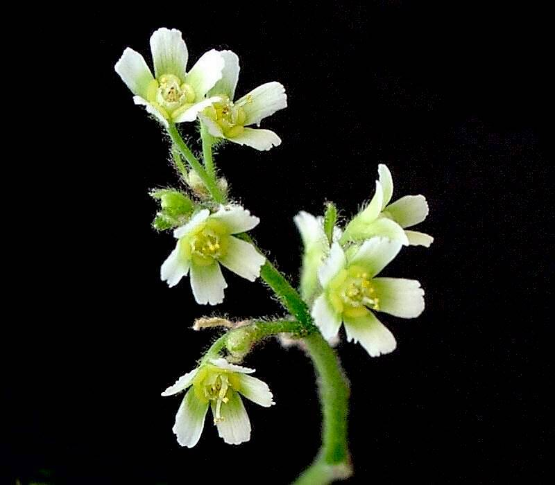 Euphorbia oaxacana